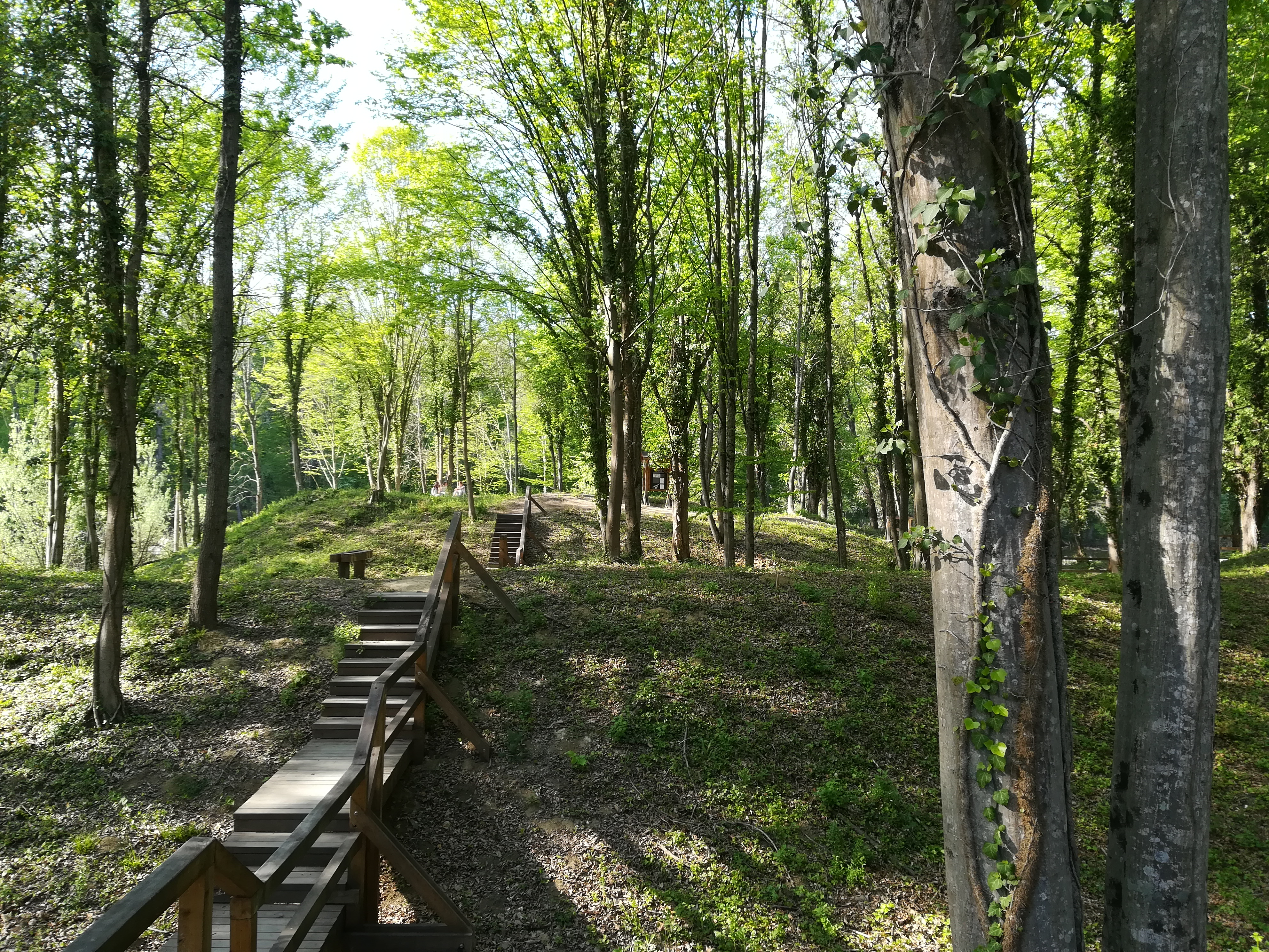 Virgrad - srednjovjekovno arheološko nalazište u blizini Bošnjaka